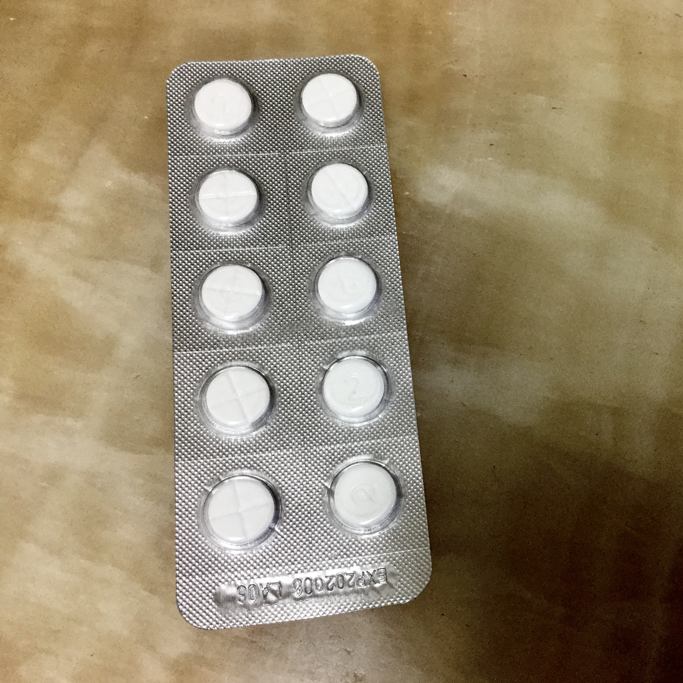 服爾眠正面包裝